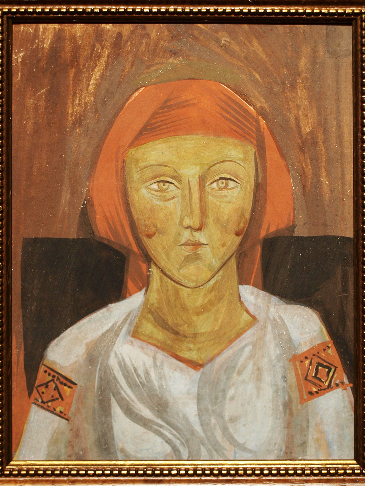 «Українка», початок 1910-х. Львівська національна галерея мистецтв імені Бориса Возницького